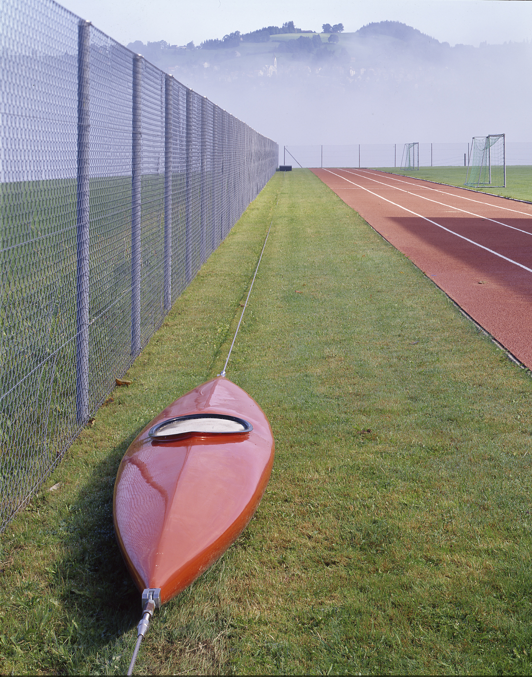 Kanu von Roman Signer, Kantonsschule Trogen